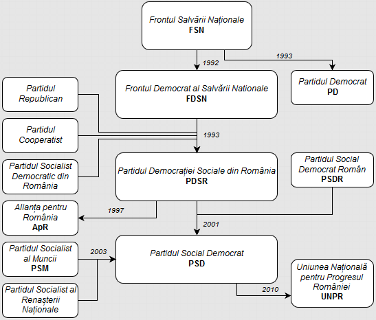 Diagramma evoluzione PSD (Romania) 1989-2010 PSD (Romania) evolution diagram 1989-2010 Diagrama evolutia PSD (Romania) 1989-2010